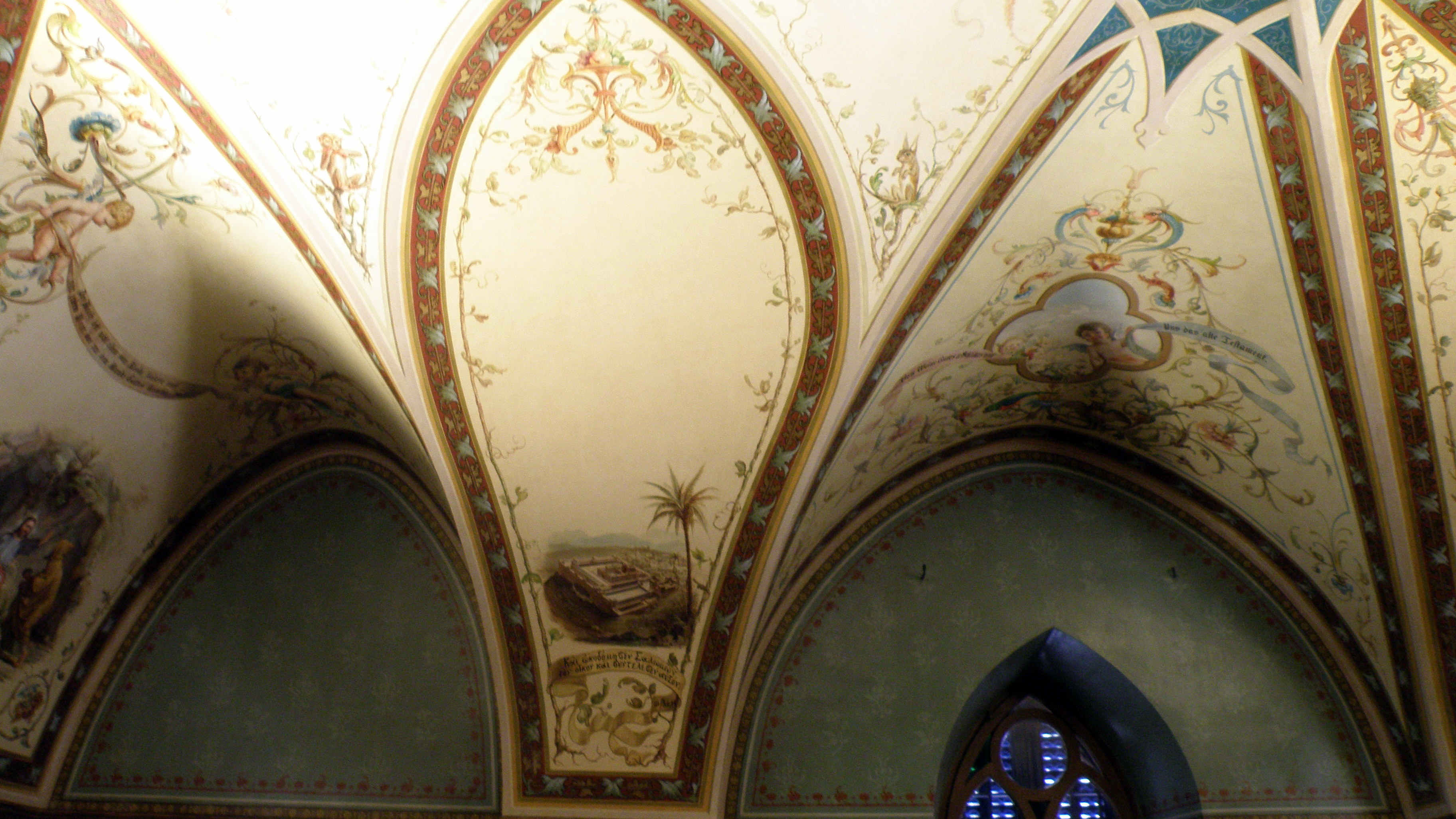 בתים מבפנים 2010